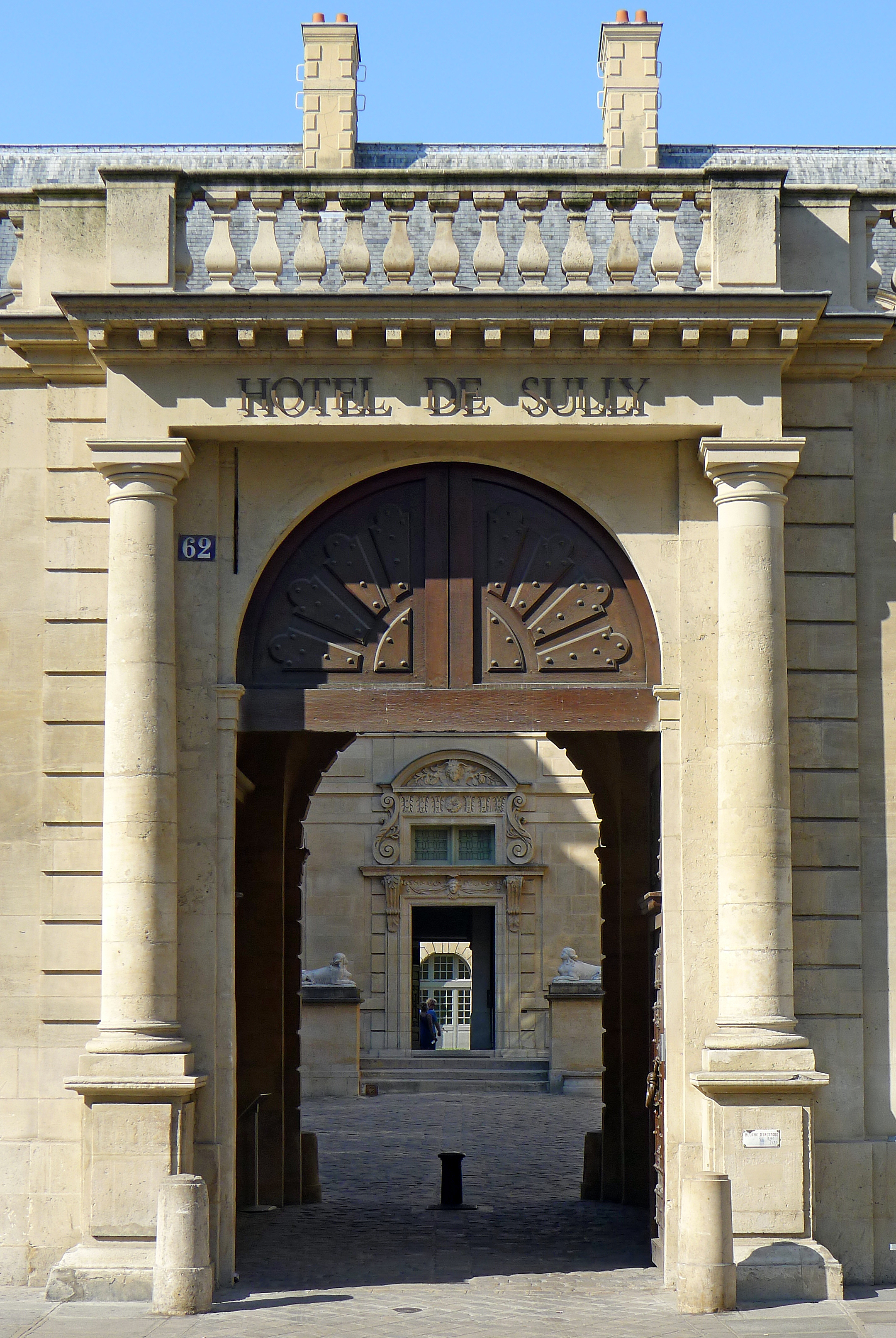 Hôtel de Sully (62 rue Saint-Antoine) - Paris IV